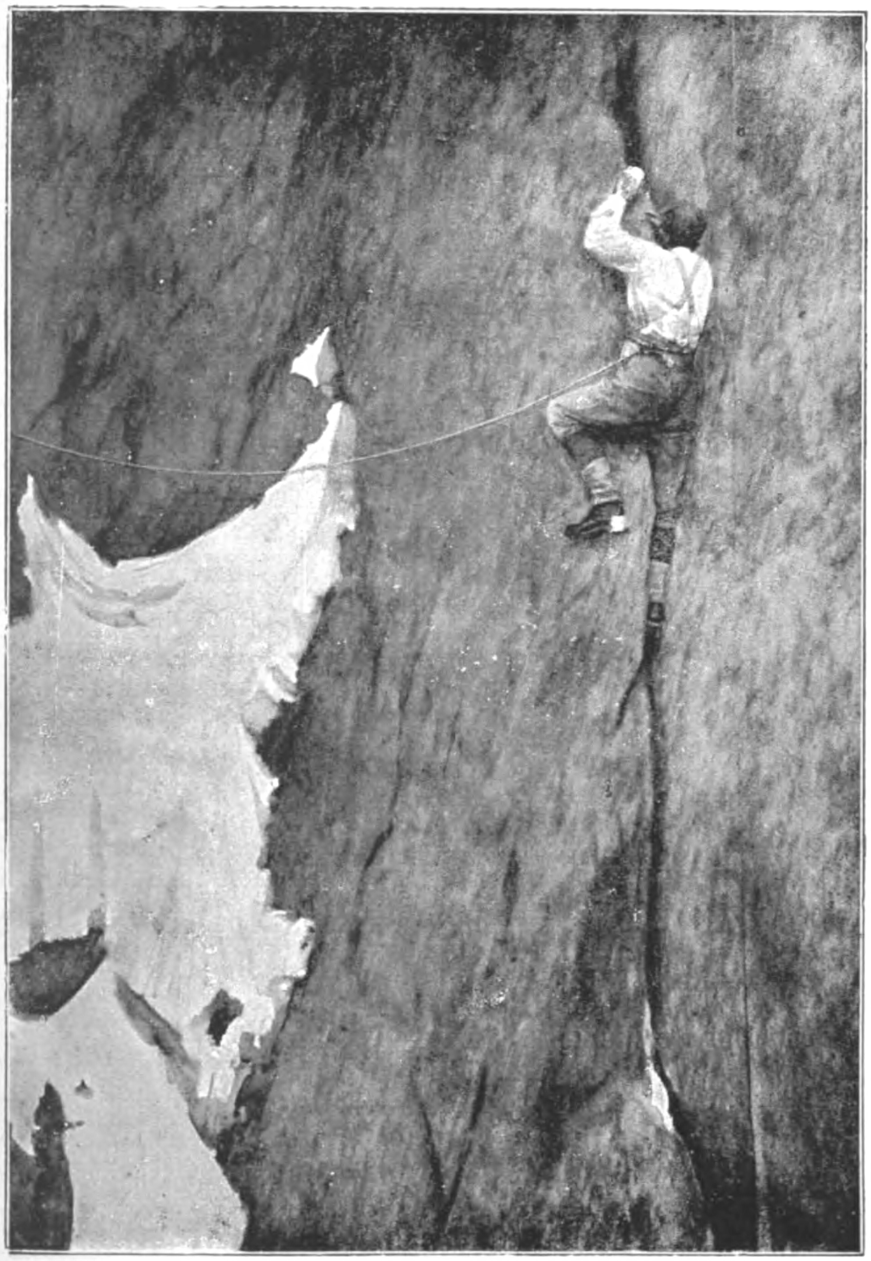 L'unique photo de A. F. (Albert Frederick) Mummery (1855-1895) escaladant.